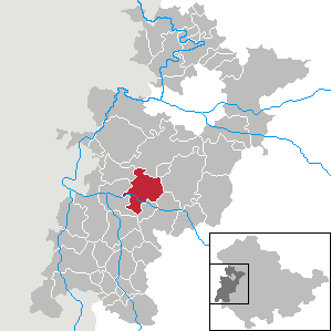 Tiefenort in Thuringia - Wartburgkreis